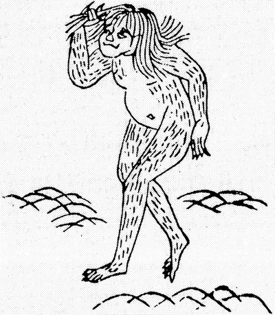 Yamawaro (山操) from the Wakan Sansai Zue (和漢三才図会)